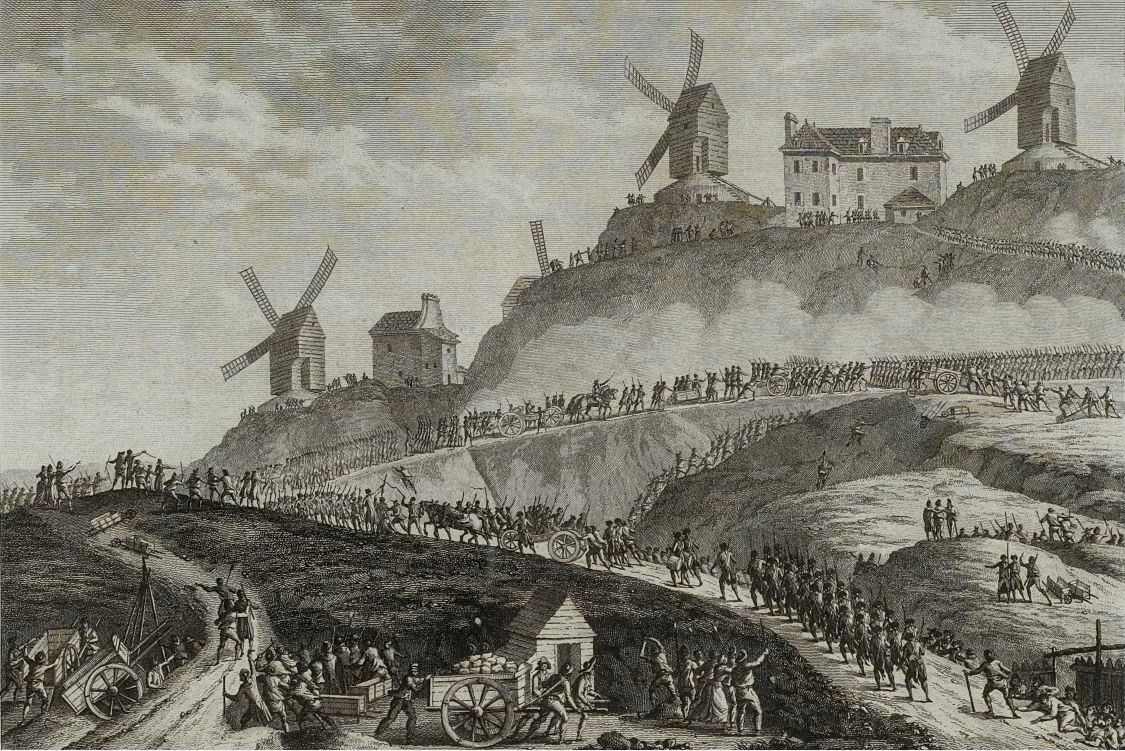 Canons de Paris portés à Montmatre, (juillet 1789). Musée de la Révolution française - Vizille.